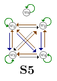 S5 frame